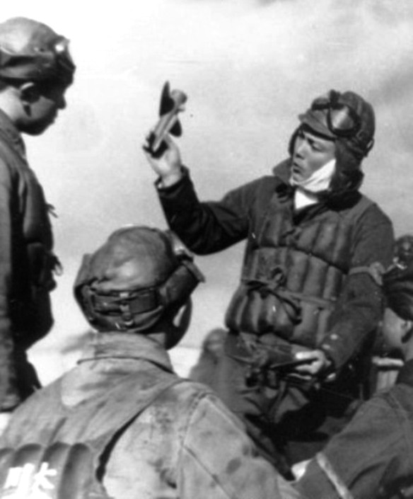 大分空時代、練習生に指導中の伊藤清